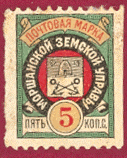 Земская почта Моршанского уезда № 30 (1899) (кат. Чучина)